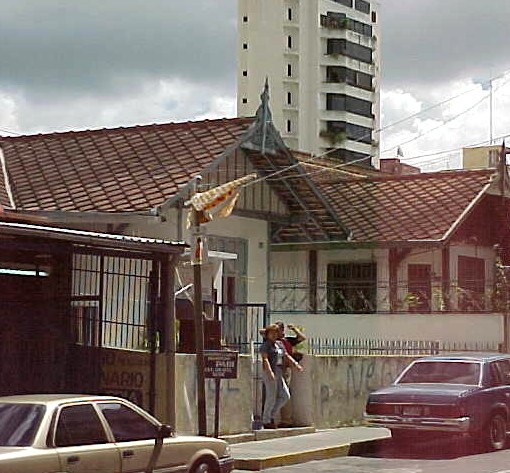 Los Teques, Estado Miranda - venezuela (2000)